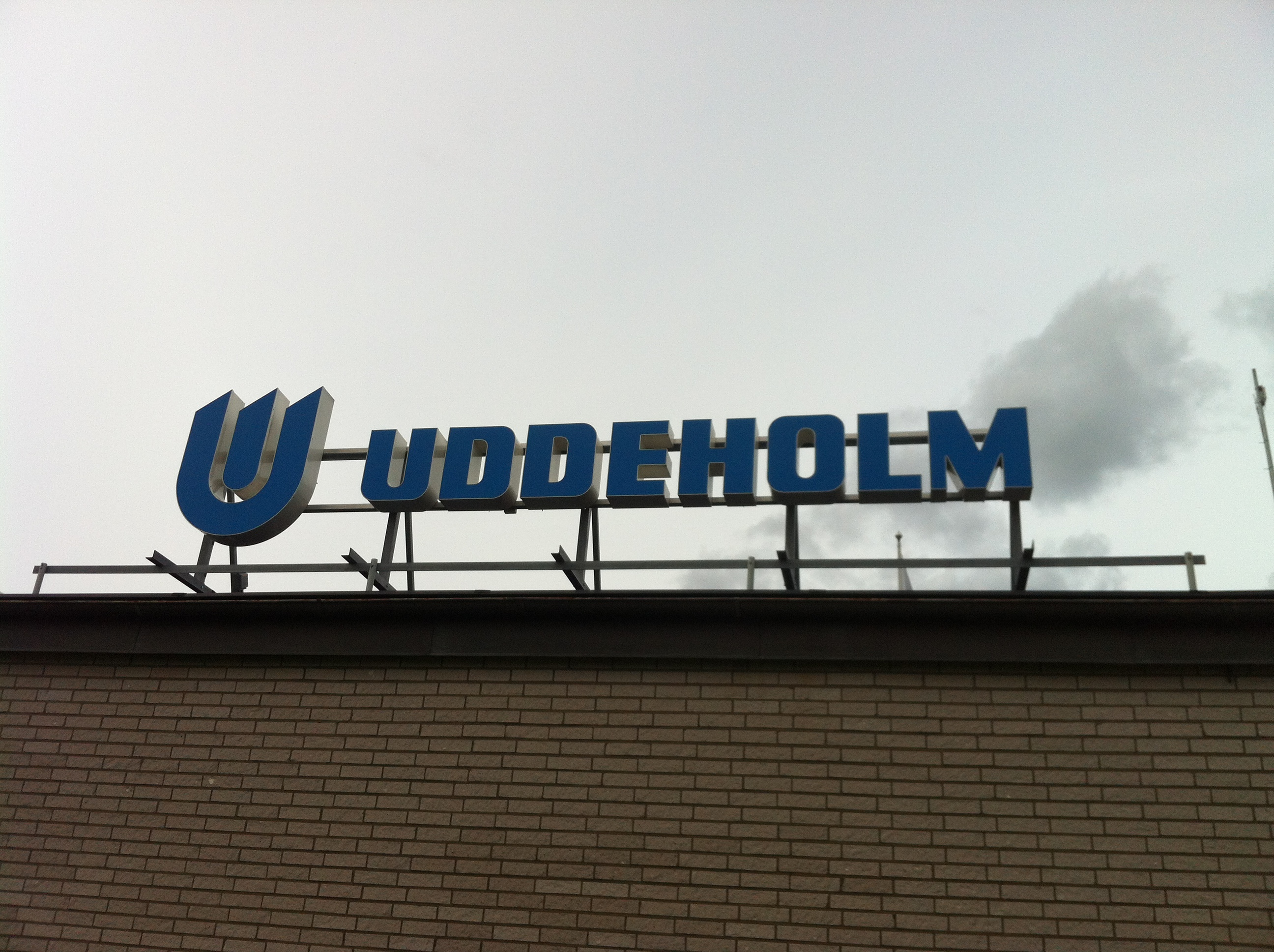 Huvudéntren till Uddeholm AB